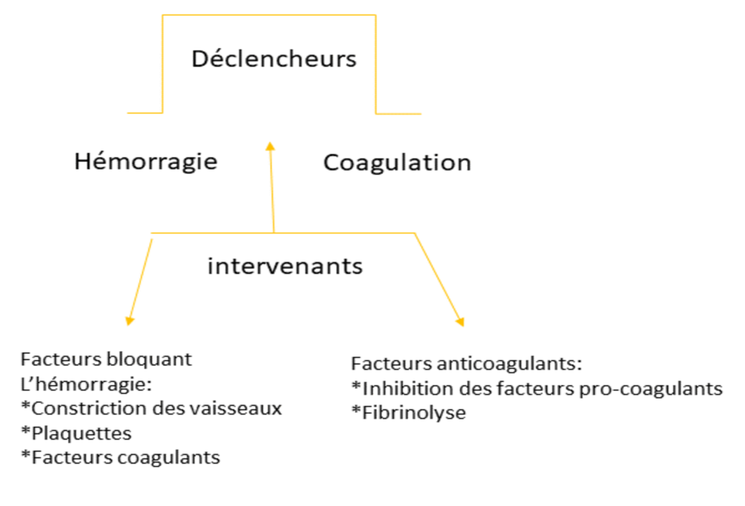 Balance Hémostatique: L'équilibre amenant au déclenchement ou l inverse la rétraction du thrombus.